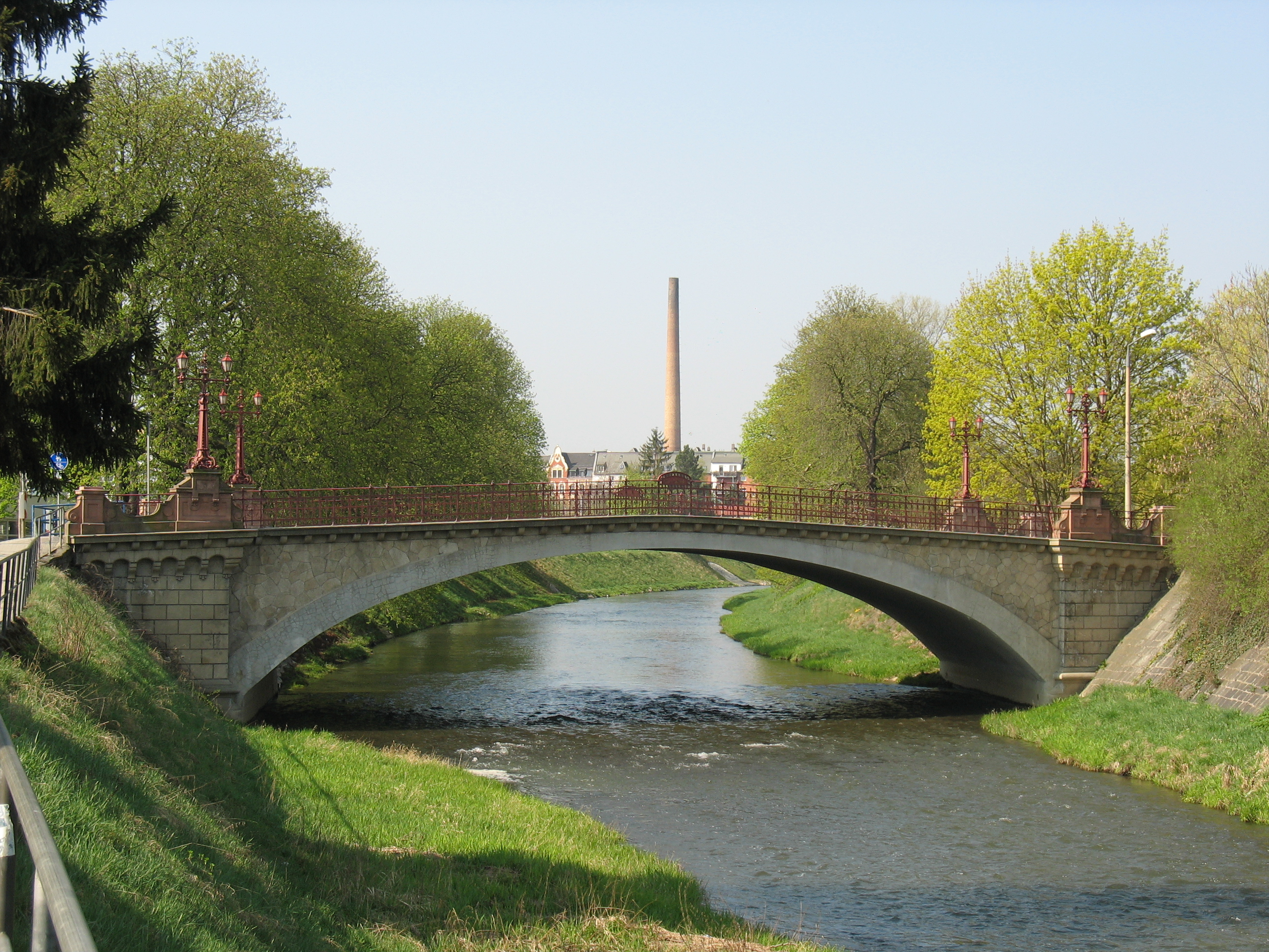 Plauen, denkmalgeschützte Gösselbrücke über die Weiße Elster (Trockentalstraße/Böhlerstraße, B92).